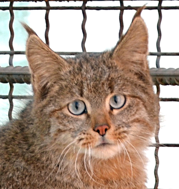 Chat de Biet (Felis silvestris bieti). Cropped from File:Chinese Mountain Cat (Felis Bieti) in XiNing Wild Zoo.jpg.